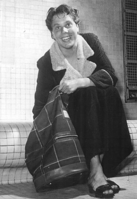 Eva-Maria ten Elsen Zentralbild Funck-Wendorf 19.4.1956 DDR-Prüfungswettkämpfe der Schwimmer Am Sonnabend und Sonntag, dem 28. und 29.4.1956, führte die Spitzenelite der DDR-Schwimmer im Berliner Stadtbad Mitte Prüfungswettkämpfe durch. UBz: Die zur DDR-Elize zählende Schwimmerin Eva-Maria ten Elsen. (SC rotation Leipzig).